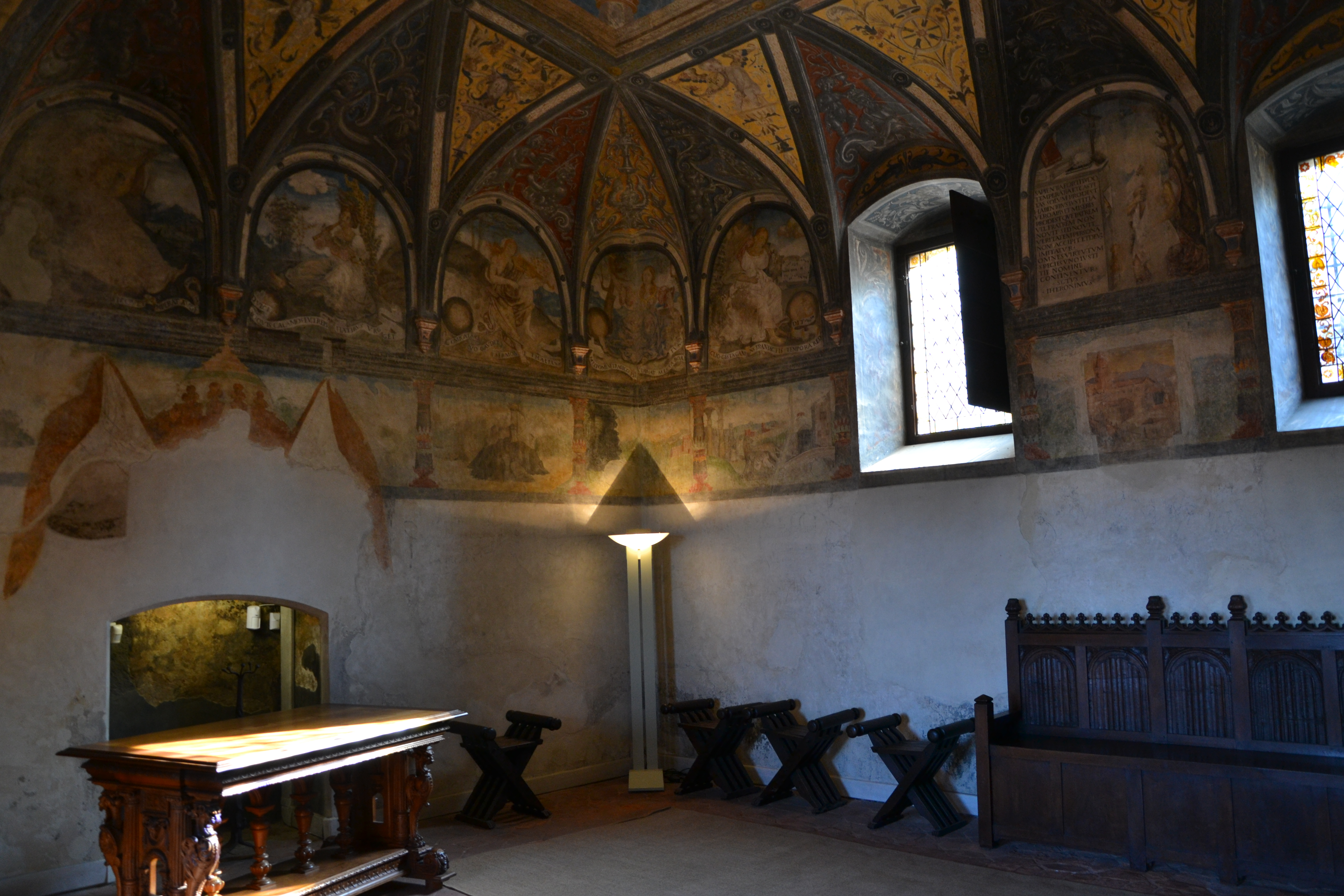 “Sala della giustizia”, studio di Francesco Cavassa, Vicario Generale del Marchesato, affreschi, realizzati tra il 1518 e il 1528 da un pittore anonimo in stile rinascimentale.